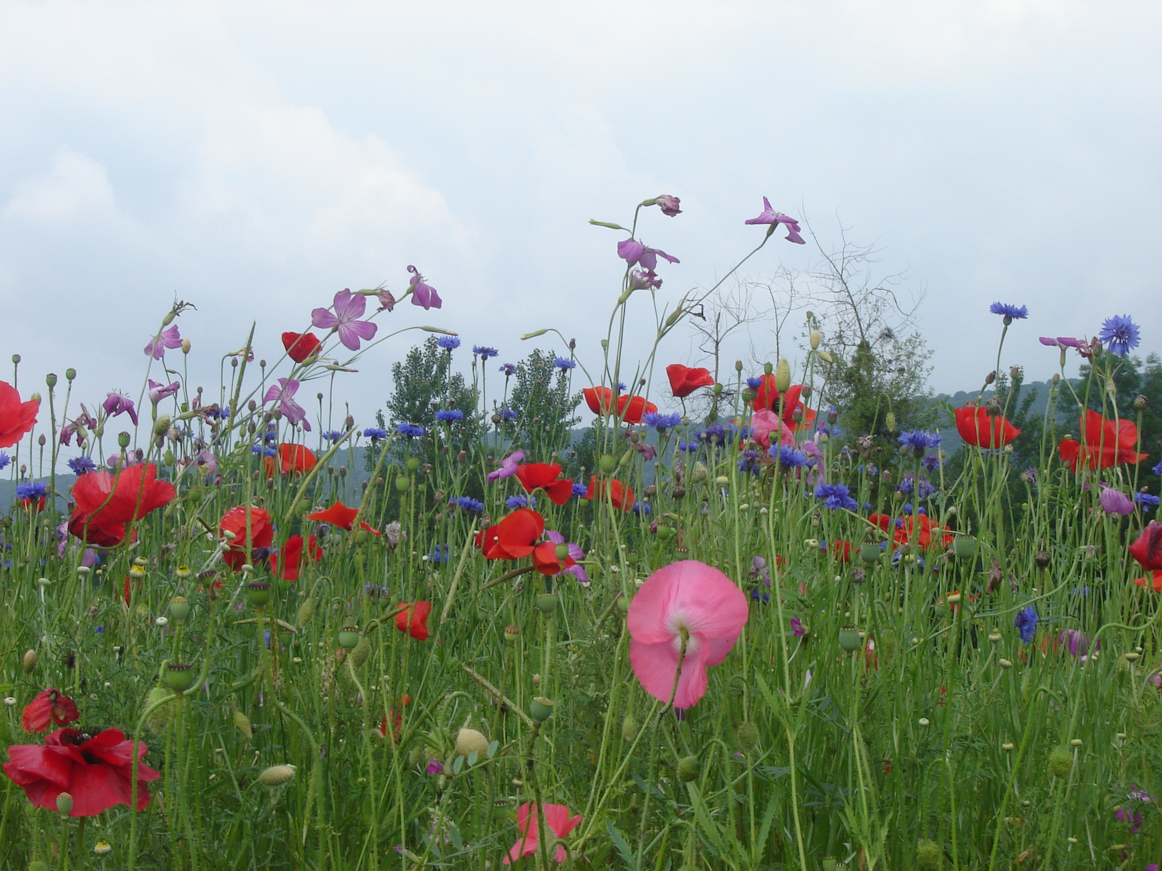 Coquelicots, bleuets, fleurs mauves sur fond de ciel et de montagnes... Un fond d'écran reposant